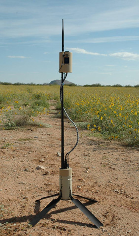 t-ugs sensor